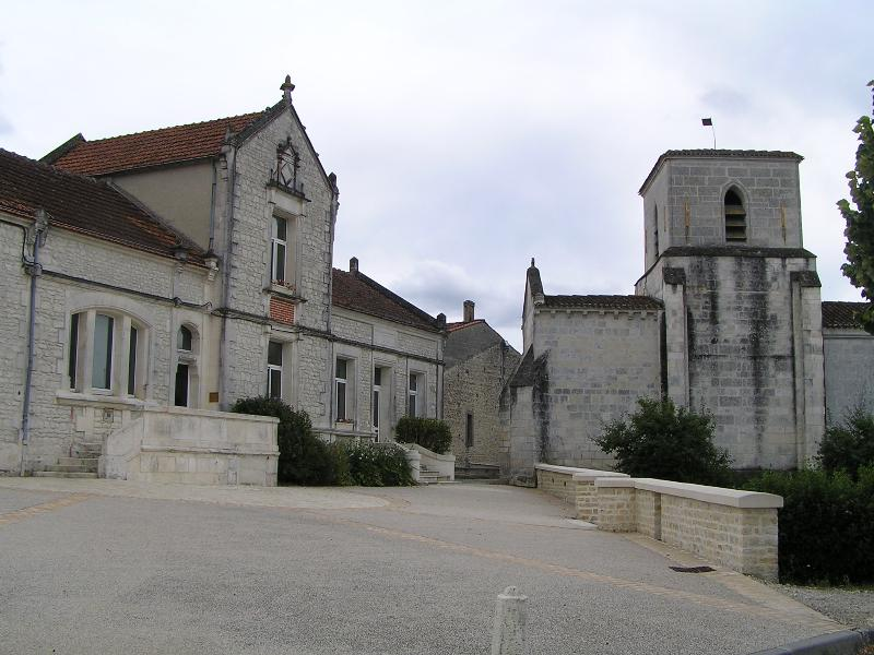 Place de Gimeux avec mairie et église